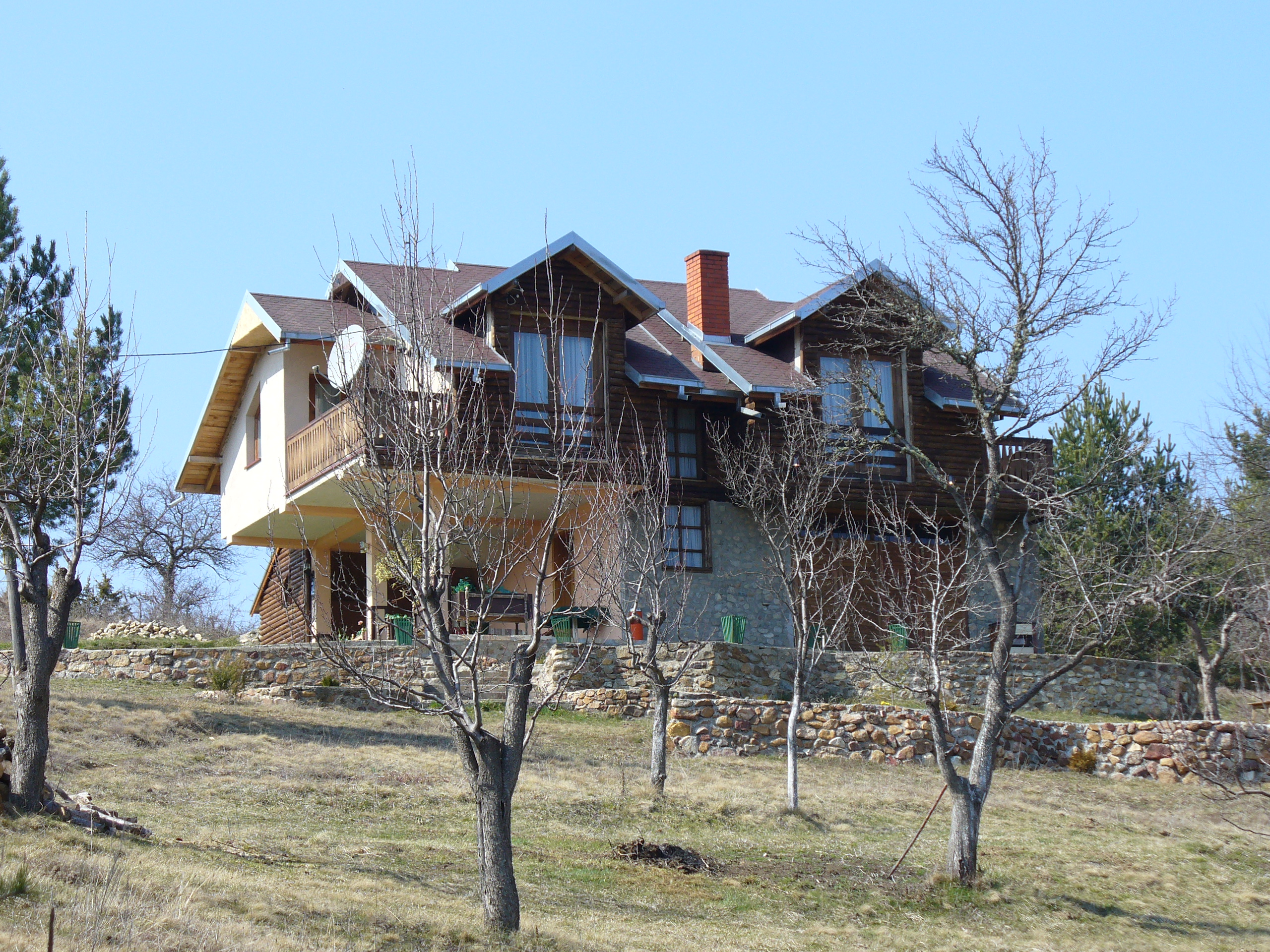 Berovo, Macedonia